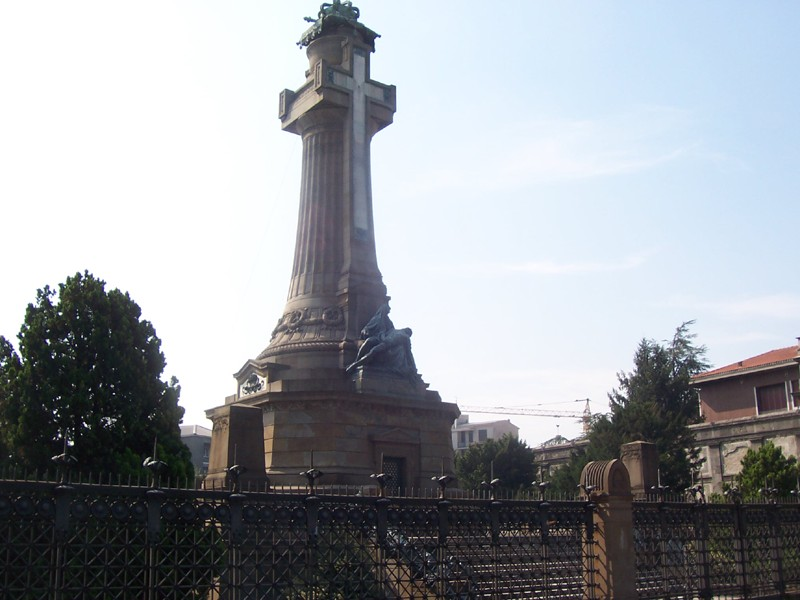 Monza - Cappella Espiatoria